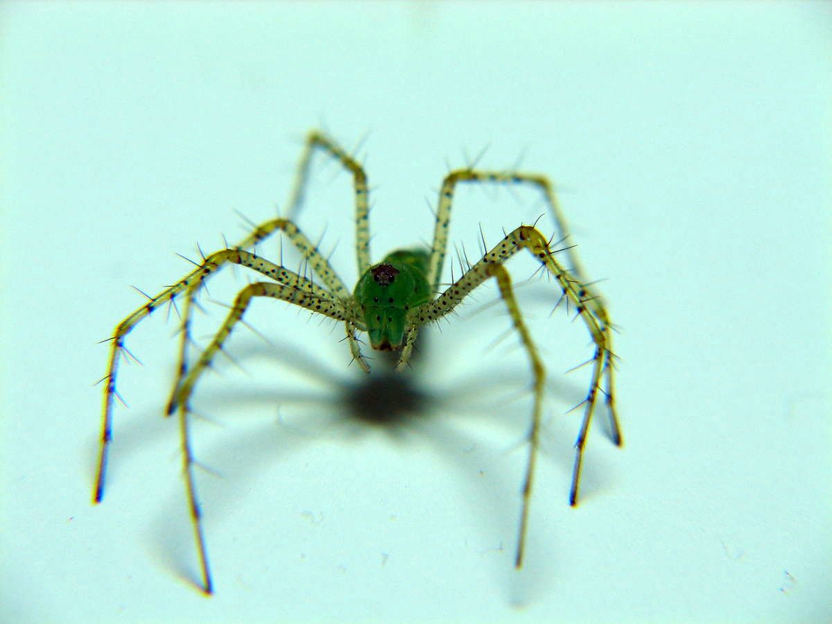 Fotografía de Araña Lince Verde (Licosoidea-Oxyopidae)